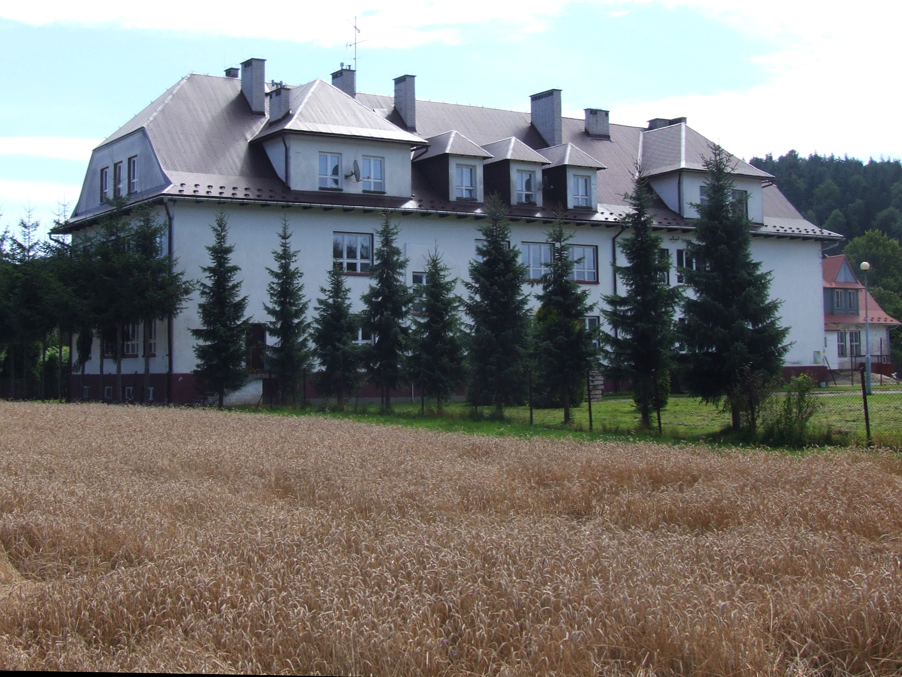 Szkoła w Piekiełku (województwo małopolskie)